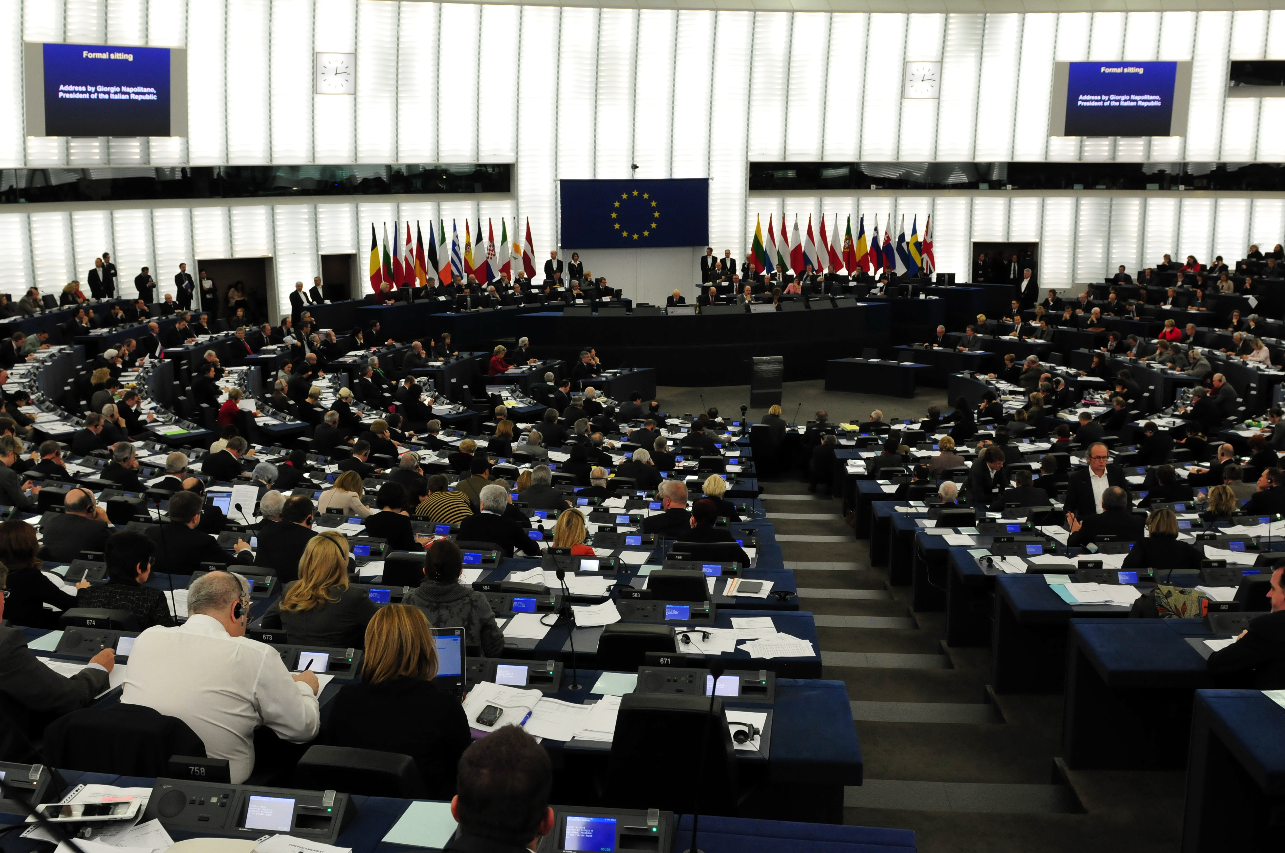 im Europaparlament; Blick vom Präsidium in den Plenarsaal European Parliament 2014 3.–7. February 2014, StrasbourgThis photo has been created within the project "WIKI loves parliaments / European Parliament". Usage and Help If you have any questions concerning this picture or how to use it, feel free to Personality rights warningAlthough this work is freely licensed or in the public domain, the person(s) shown may have rights that legally restrict certain re-uses unless those depicted consent to such uses. In these cases, a model release or other evidence of consent could protect you from infringement claims.